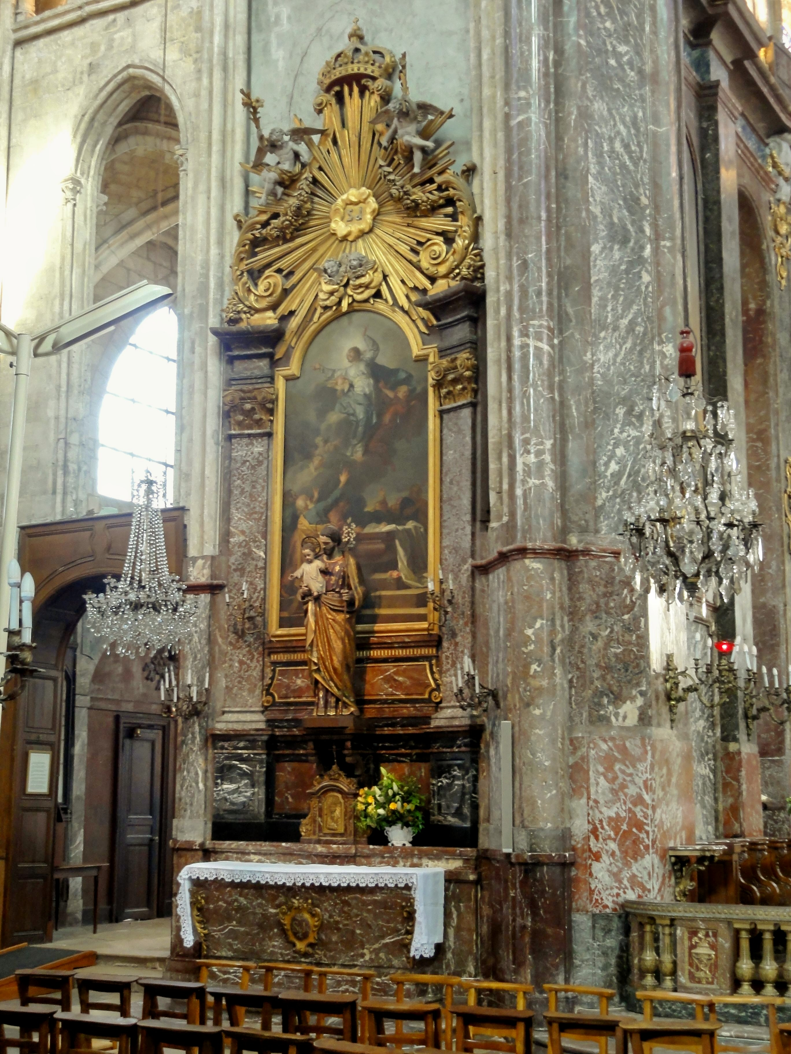 Autel secondaire à gauche - l'Assomption de Marie.